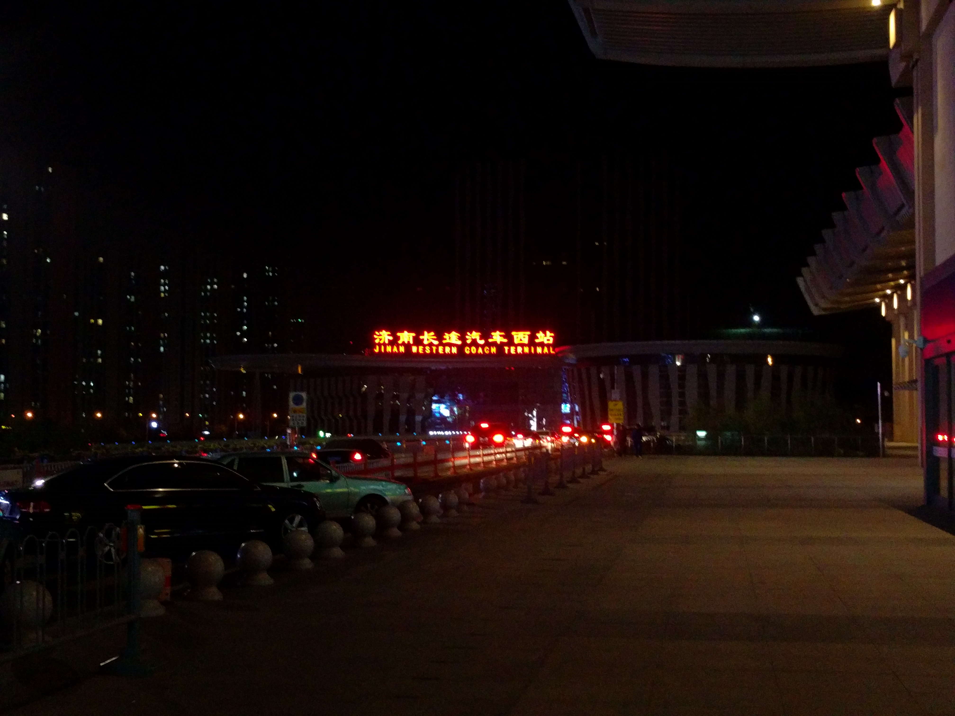 济南长途汽车西站